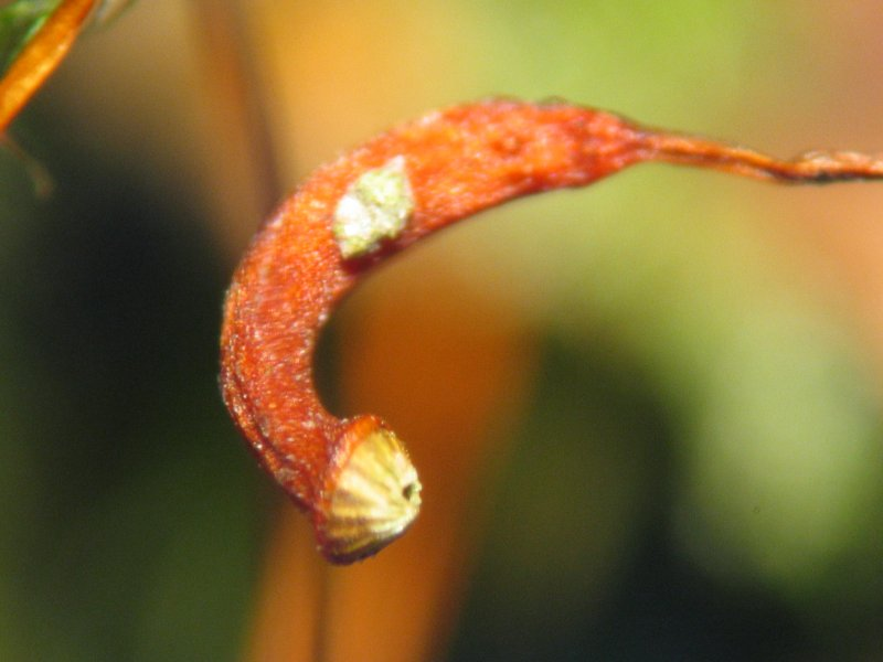 Schlesisches Stumpenmoos (Sharpiella seligeri / Herzogiella seligeri), Kapsel, etwa 30x vergrößert